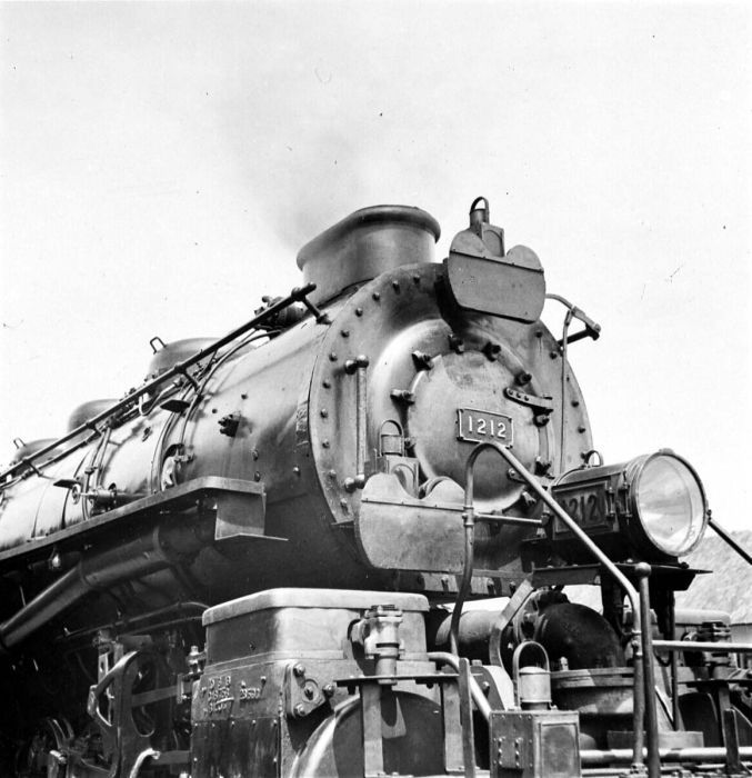 Repronegatief. Een berglocomotief van de Staatsspoorwegen in Bandoeng, West-Java